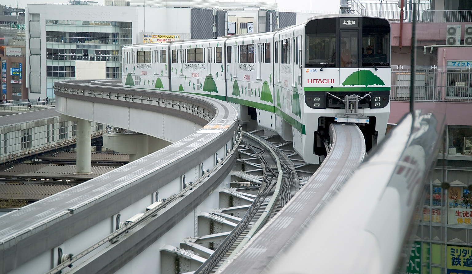 Tama Toshi Monorail Tachikawa Tokyo Japan